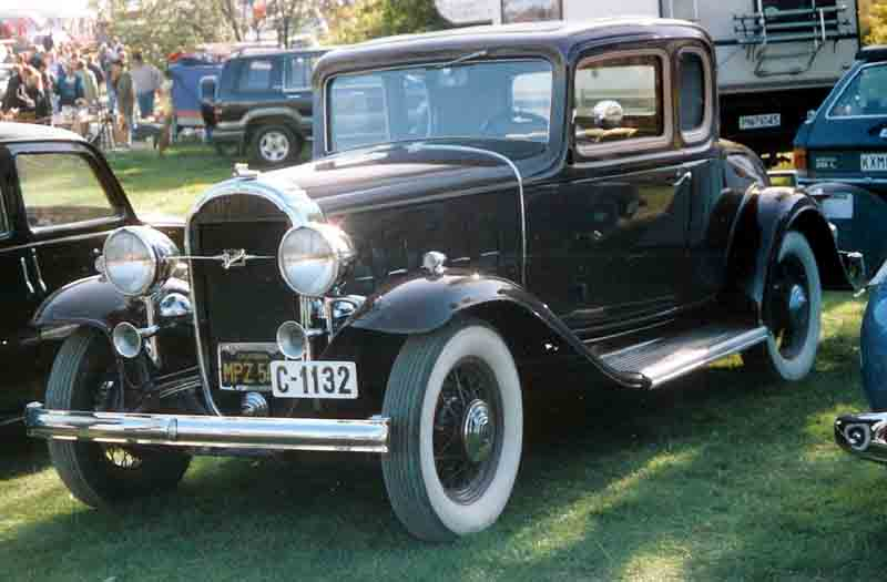 1932 Buick Series 50 Model 56 Business Coupe